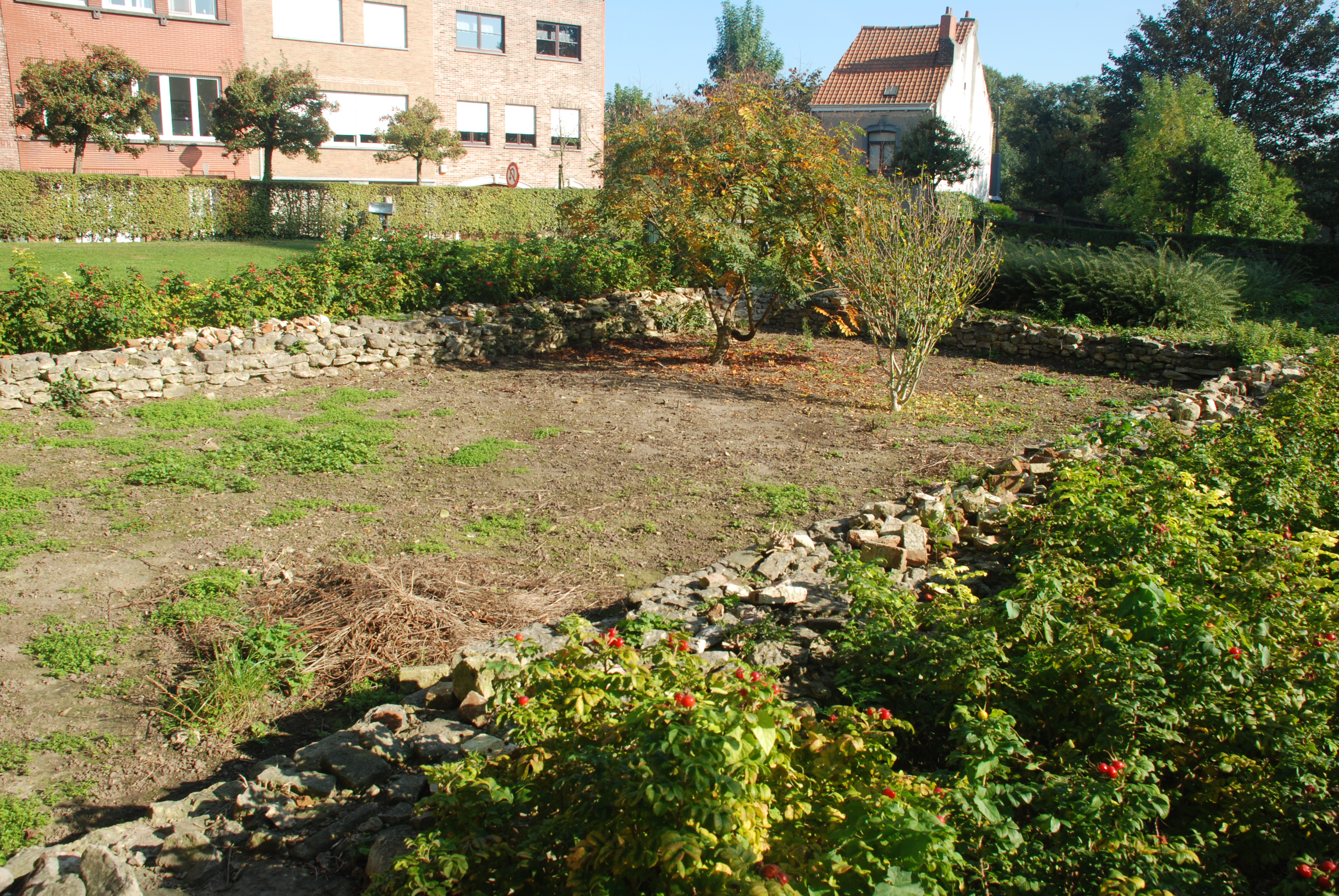 Belgique - Bruxelles - Tour romane de Neder-Heembeek